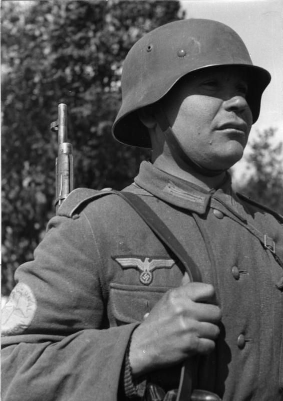 Wolga-Tartare Foto H. Philipps Wehrbilderdienst Nr. 464/33a